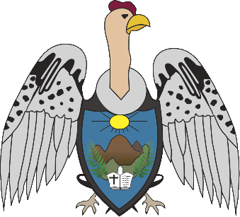 El escudo consta de una ave, el condor, parado en sus dos patas, abriendo las alas, en el pecho de este se encuentra una pequeña insignia, donde esta inmersa la espada de nuestro patron "El Apostol Santiago el Mayor"